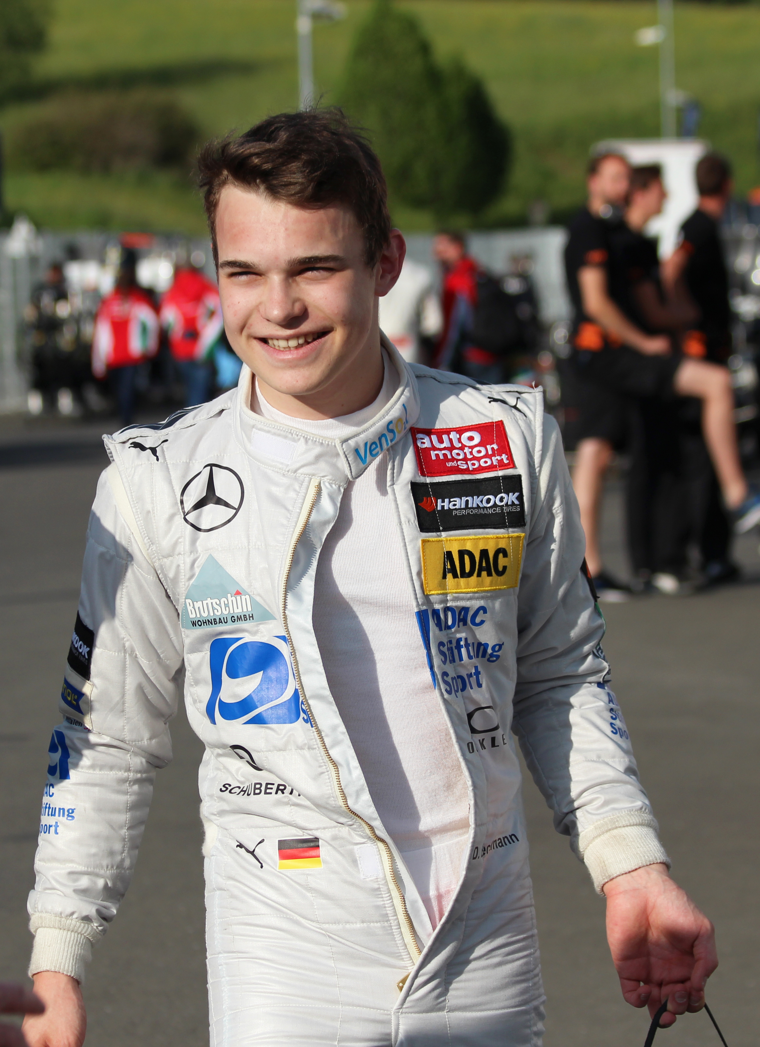 David Beckmann